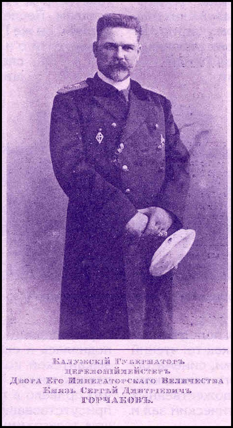 Сергей Дмитриевич Горчаков, князь (1861–1927) — последний владелец усадьбы Барятино, сын князя Д.С.Горчакова, действительный статский советник, церемониймейстер двора е.и.в., губернатор вятский и калужский. С 1895 г. — тарусский уездный предводитель дворянства. Попечитель и почетный член более 20 научных и благотворительных обществ. Заслугой кн. Горчакова и его супруги Анны Евграфовны, урожденной гр. Комаровской, можно считать постройку в Калуге Народного дома. При губернаторе Горчакове в Калуге открылся первый детский сад, создан Калужский отдел Всероссийской лиги для борьбы с туберкулезом и т.д.